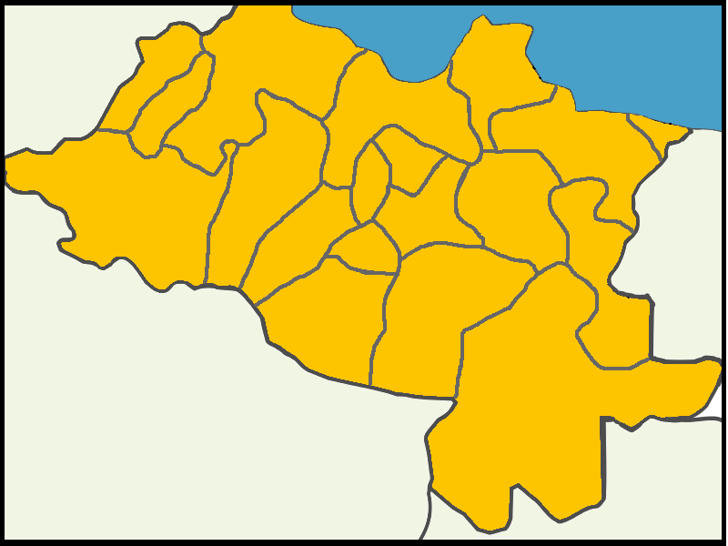 Ordu'da 2014 Türkiye cumhurbaşkanlığı seçimi